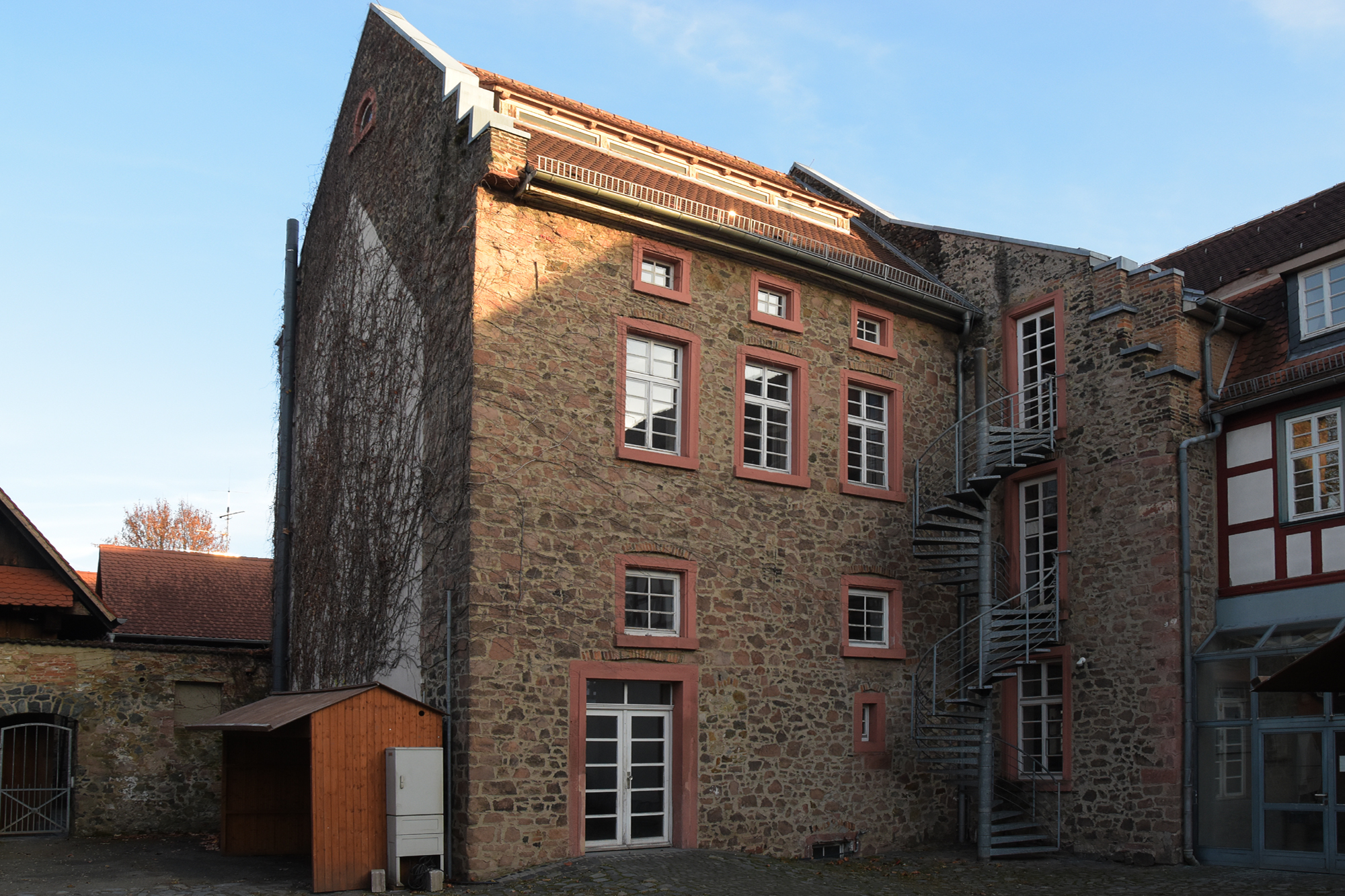 Denkmalgeschütztes Gebäude in Darmstadt-Eberstadt, ehem. Brauhaus, jetzt Haus der Vereine.